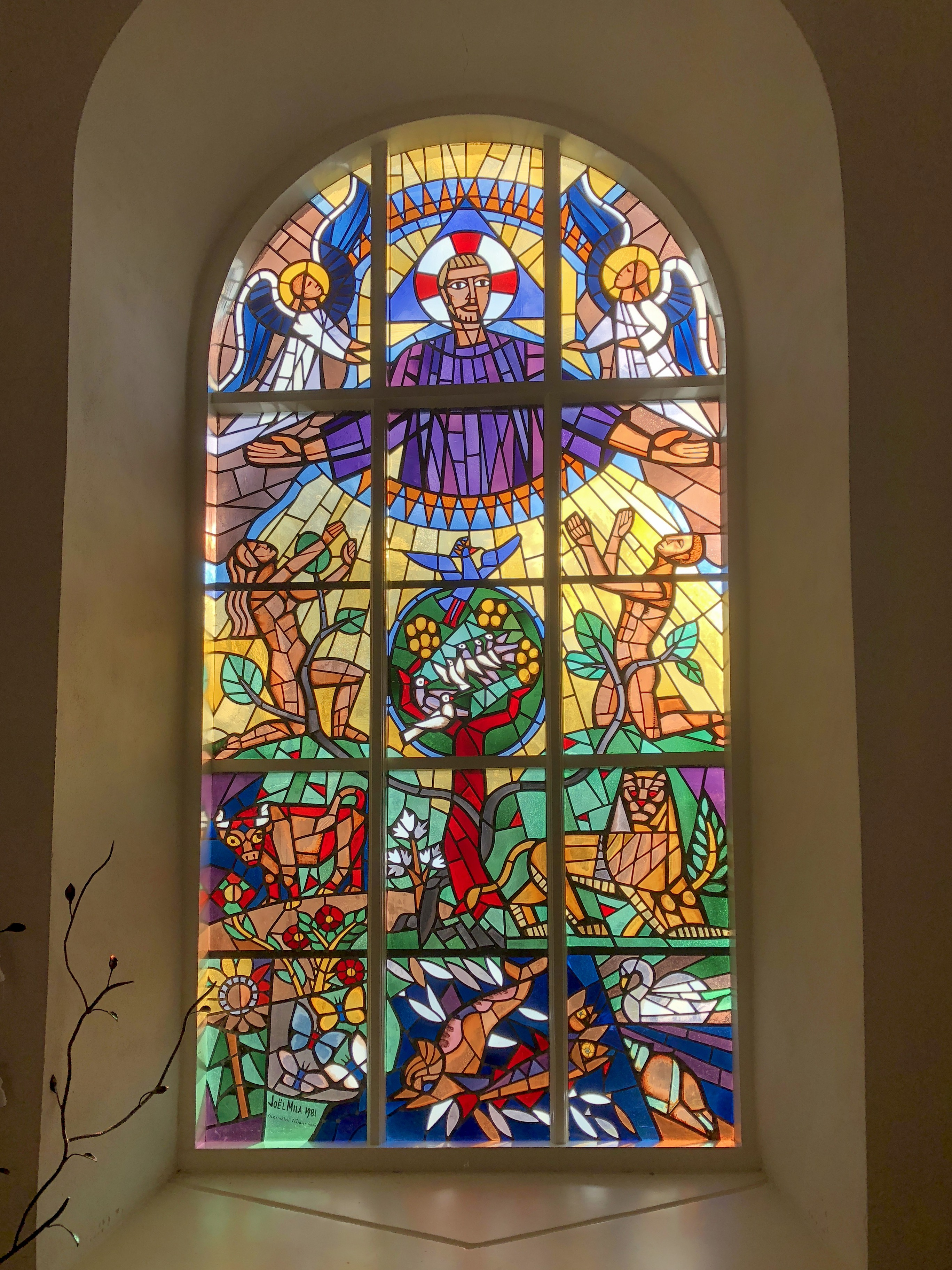 Korfönster i Släps kyrka. Utförda 1981 av Joël Mila.